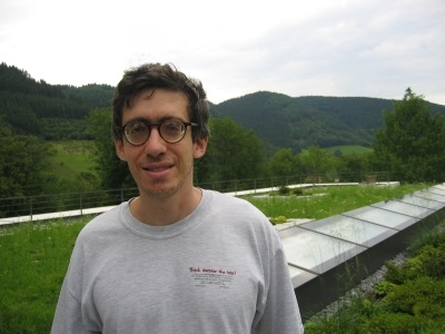 Noam Elkies 2007 in Oberwolfach